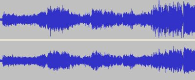 Lydklip. Signatur